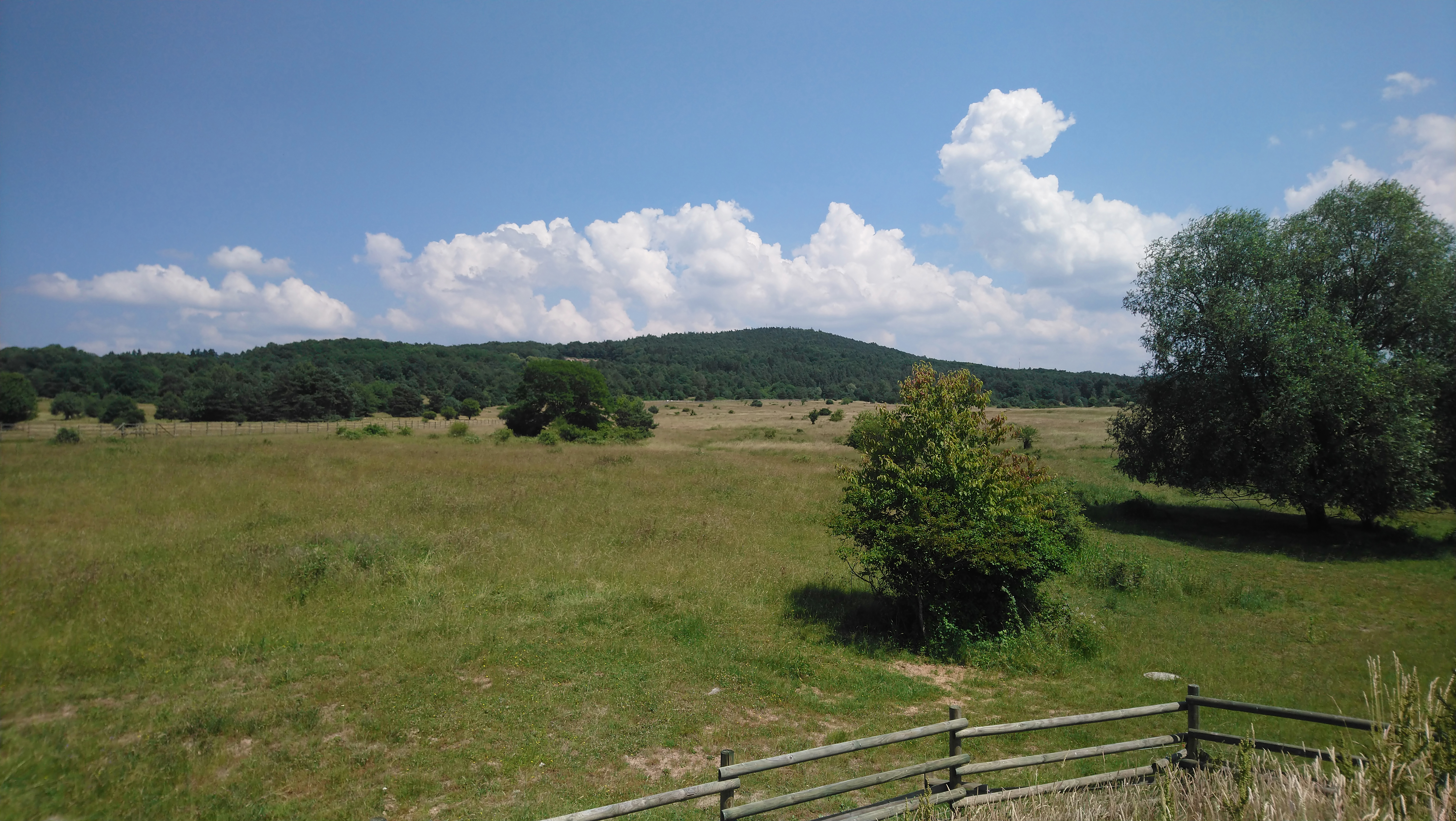 Der Stengerts bei Schweinheim vom Naturschutzgebiet an der Range Control gesehen